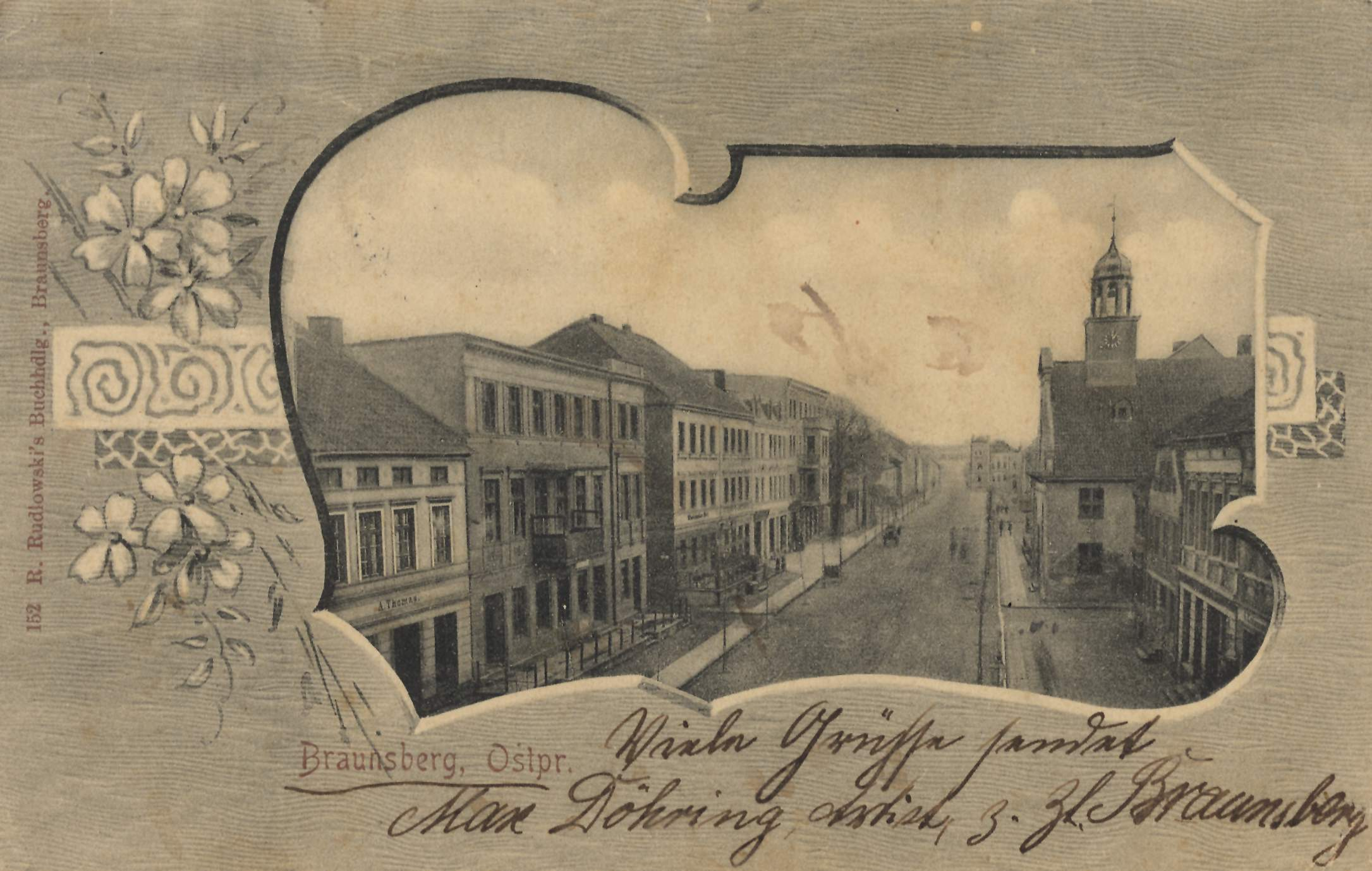 Straßenansicht